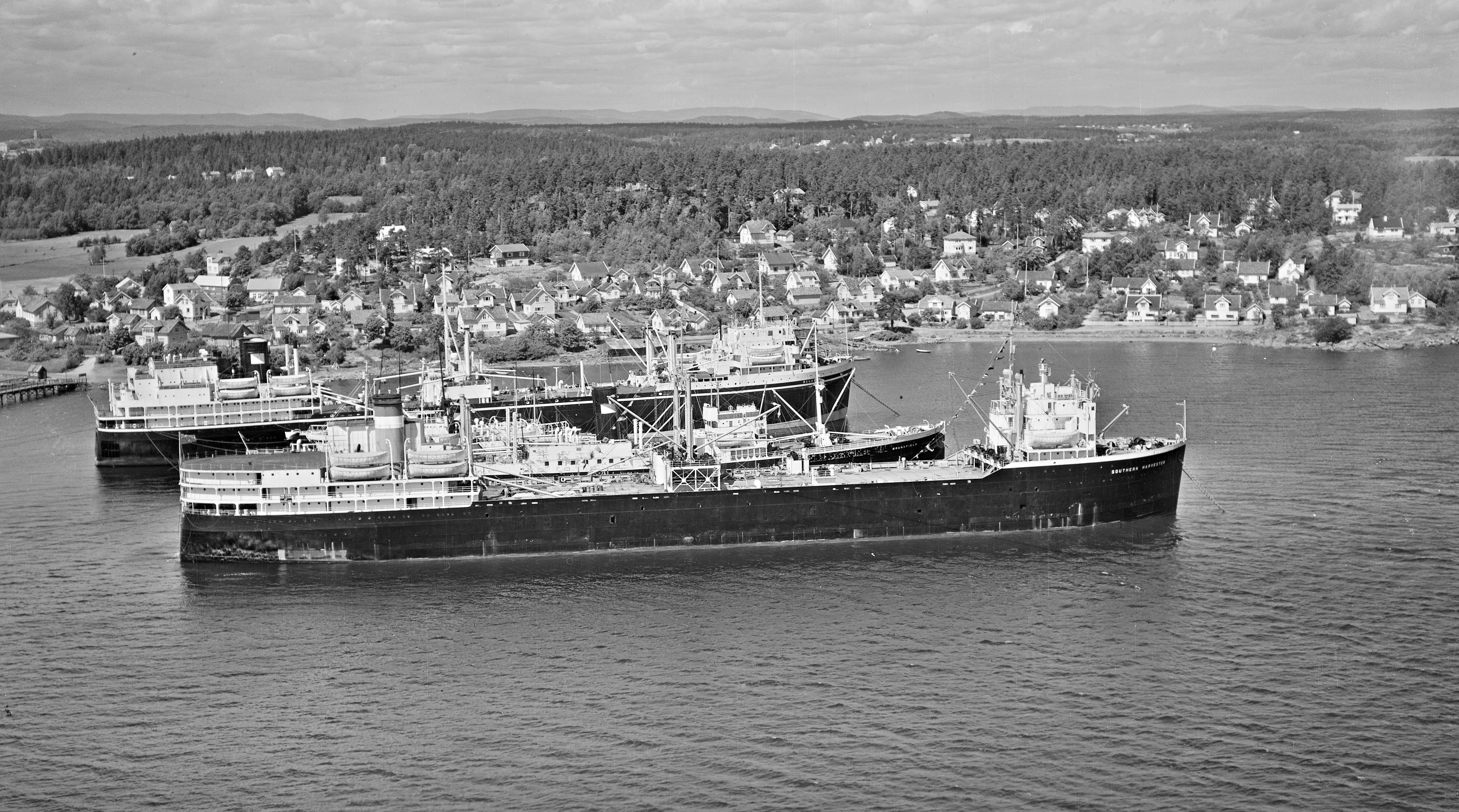 WF.S.A4437 Båtene: Southern Harvester i forgrunnen, Brandsfield i midten, Balaena i bakgrunnen. Oberståsen i bakgrunnen, nærmest husene (Husvik, Tønsberg, tidligere Sem). Røren og Brekke (til høyre) i bakgrunnen